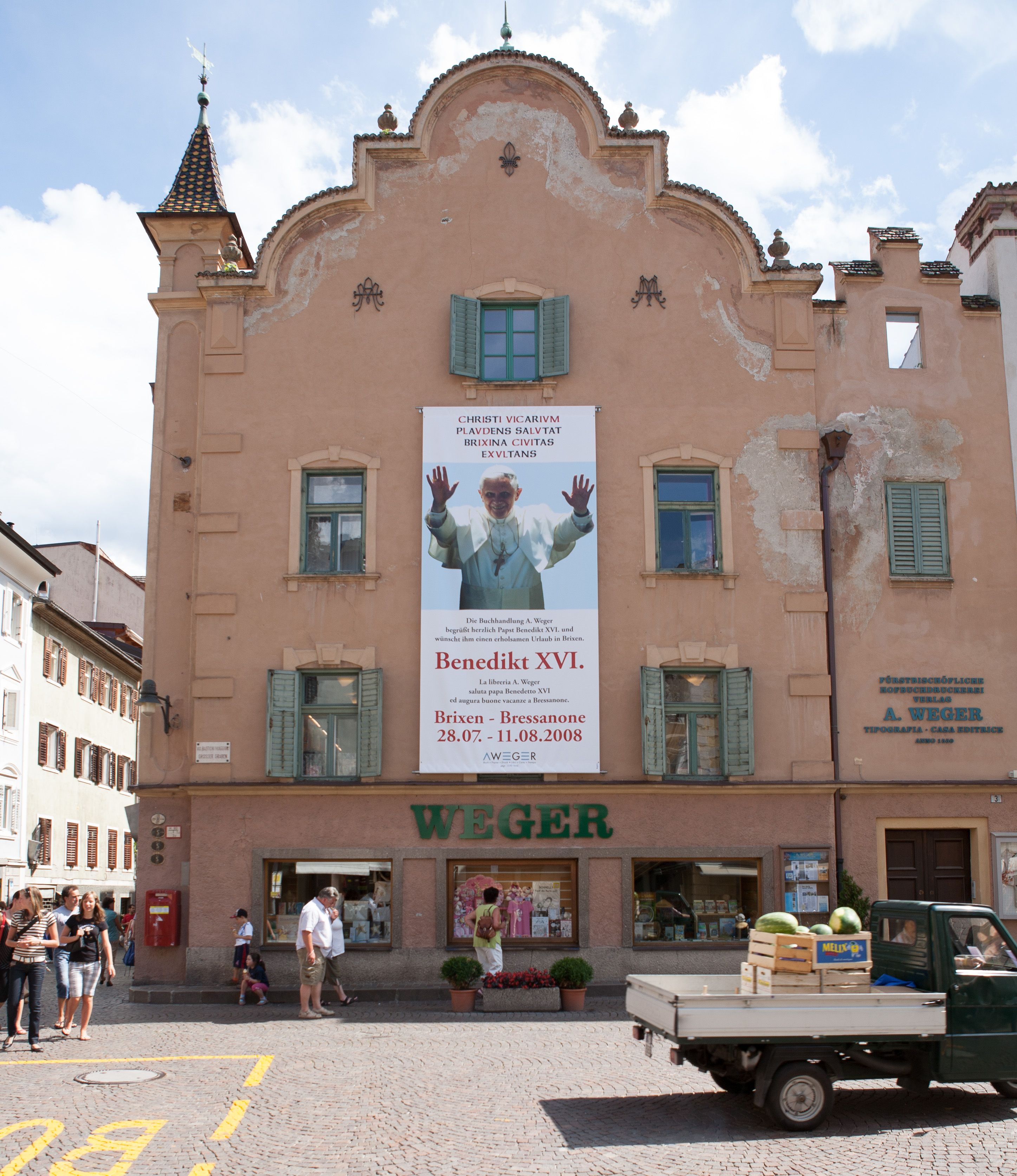 Weger Verlag und Buchhandlung A. Weger, Großer Graben 3, Ecke Weißenturmgasse, Brixen, Südtirol – Verlag und Buchhandlung würdigen großformatig an der Fassade ihres Geschäftshauses den bevorstehenden Sommerurlaub 2008 von Benedikt XVI. in Brixen, Object location46° 43′ 01.61″ N, 11° 39′ 27.32″ E